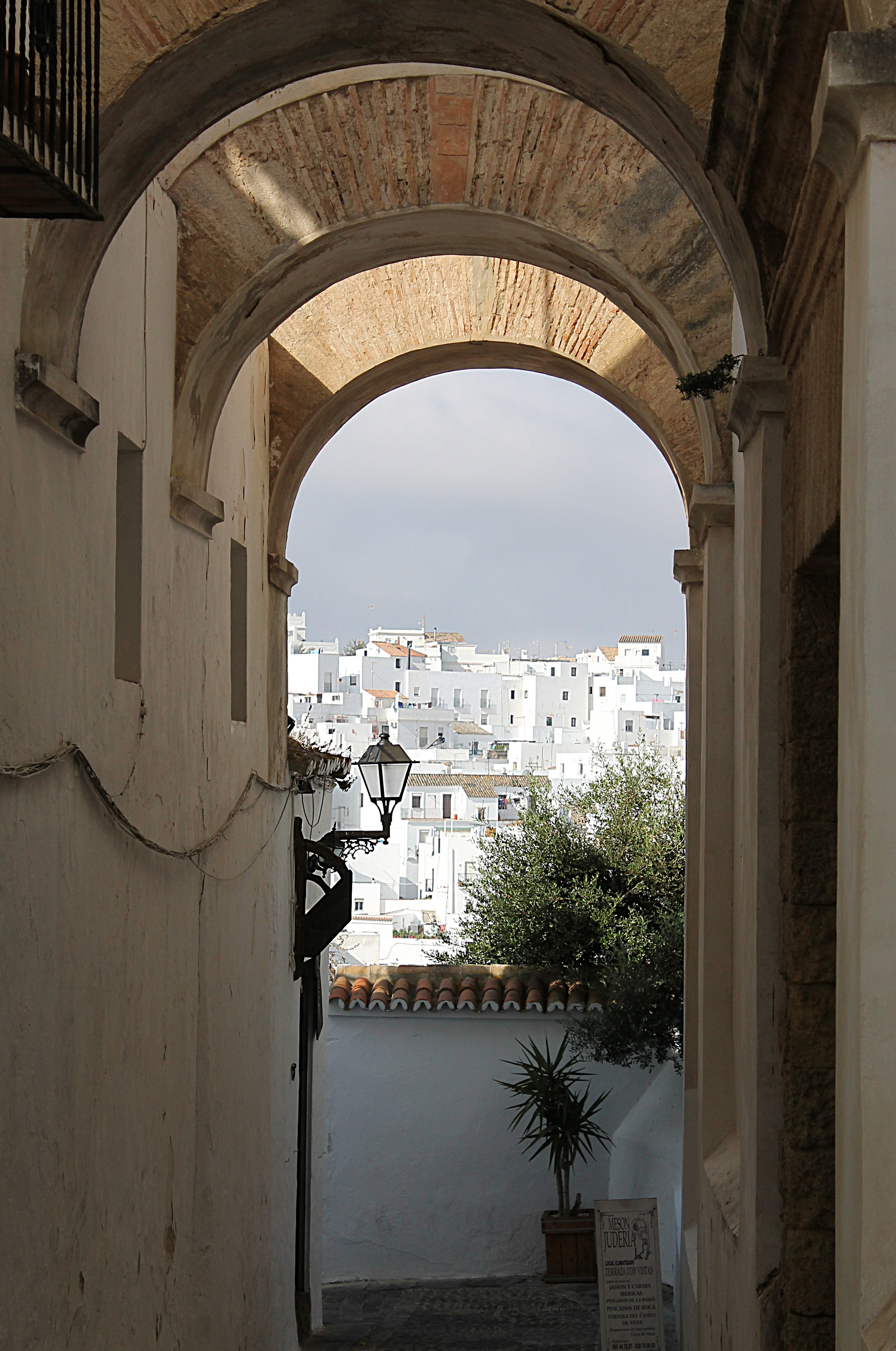 Les remparts furent érigés au XVème siècle pour repousser les incursions nasrides.